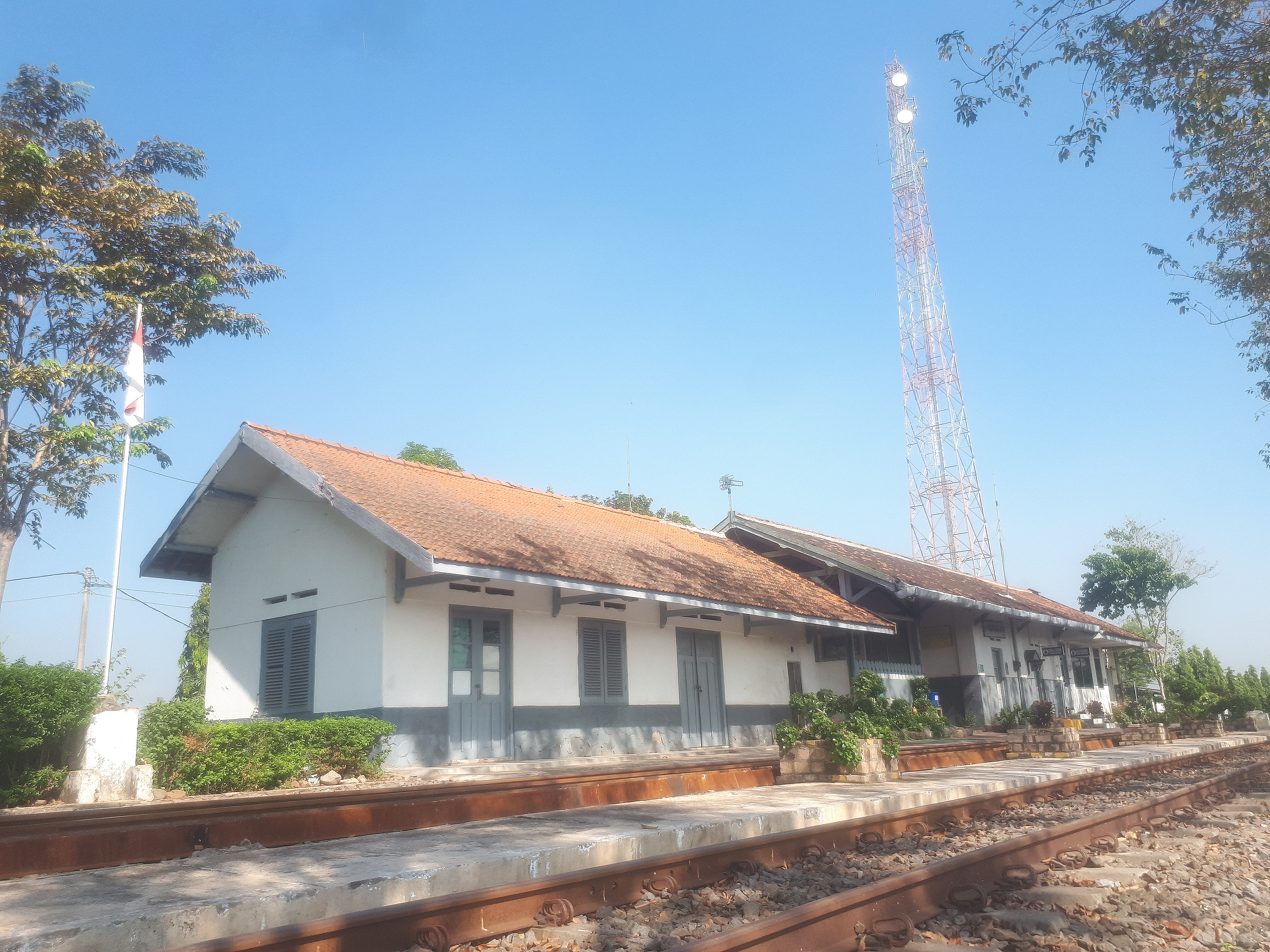 Tampak luar Stasiun Grati, 2020